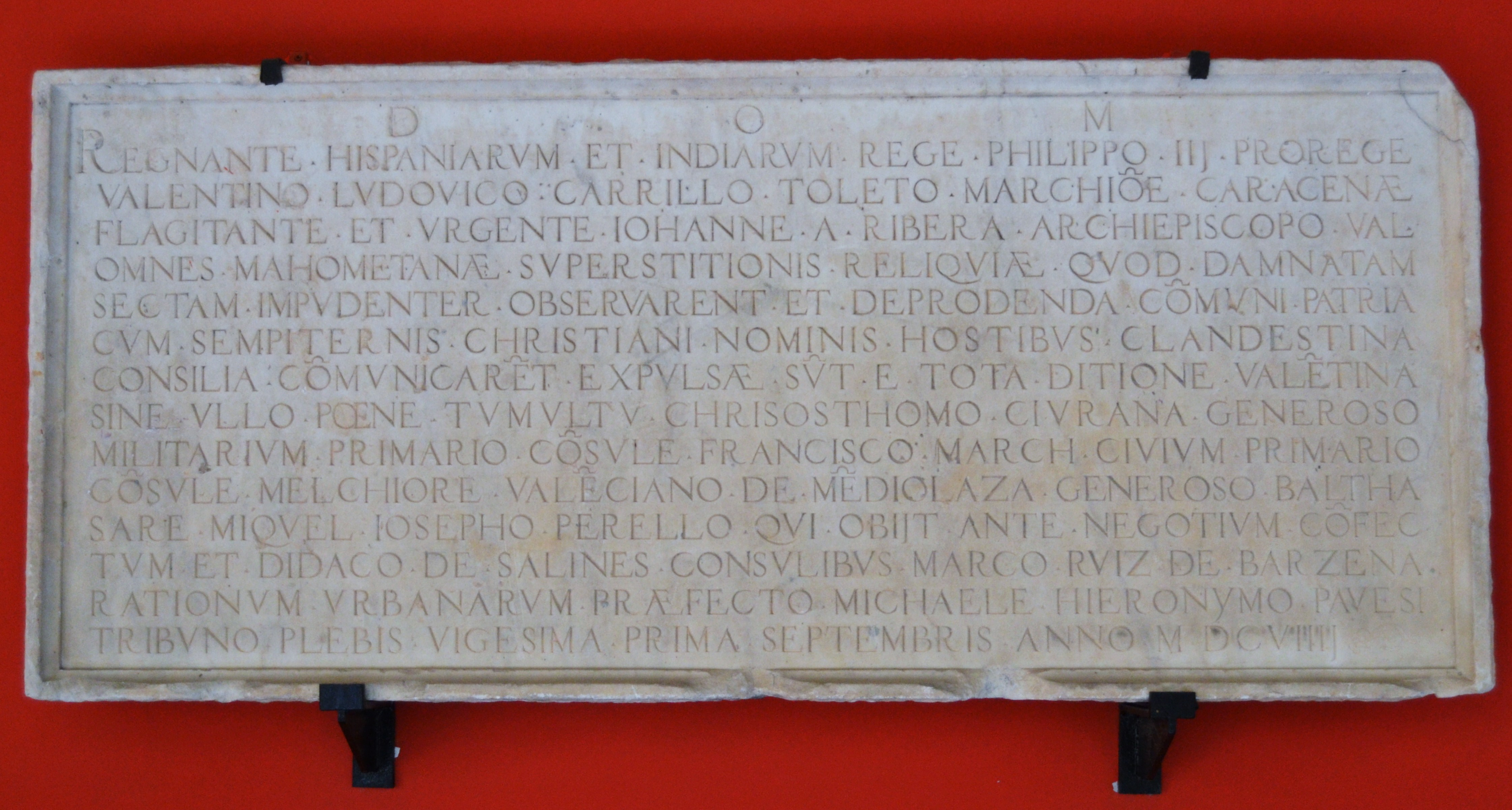 Làpida commemorativa relativa a l'expulsió dels moriscos (1609), marbre, 74 x 165 x 11 cm. Museu de Belles Arts de València.